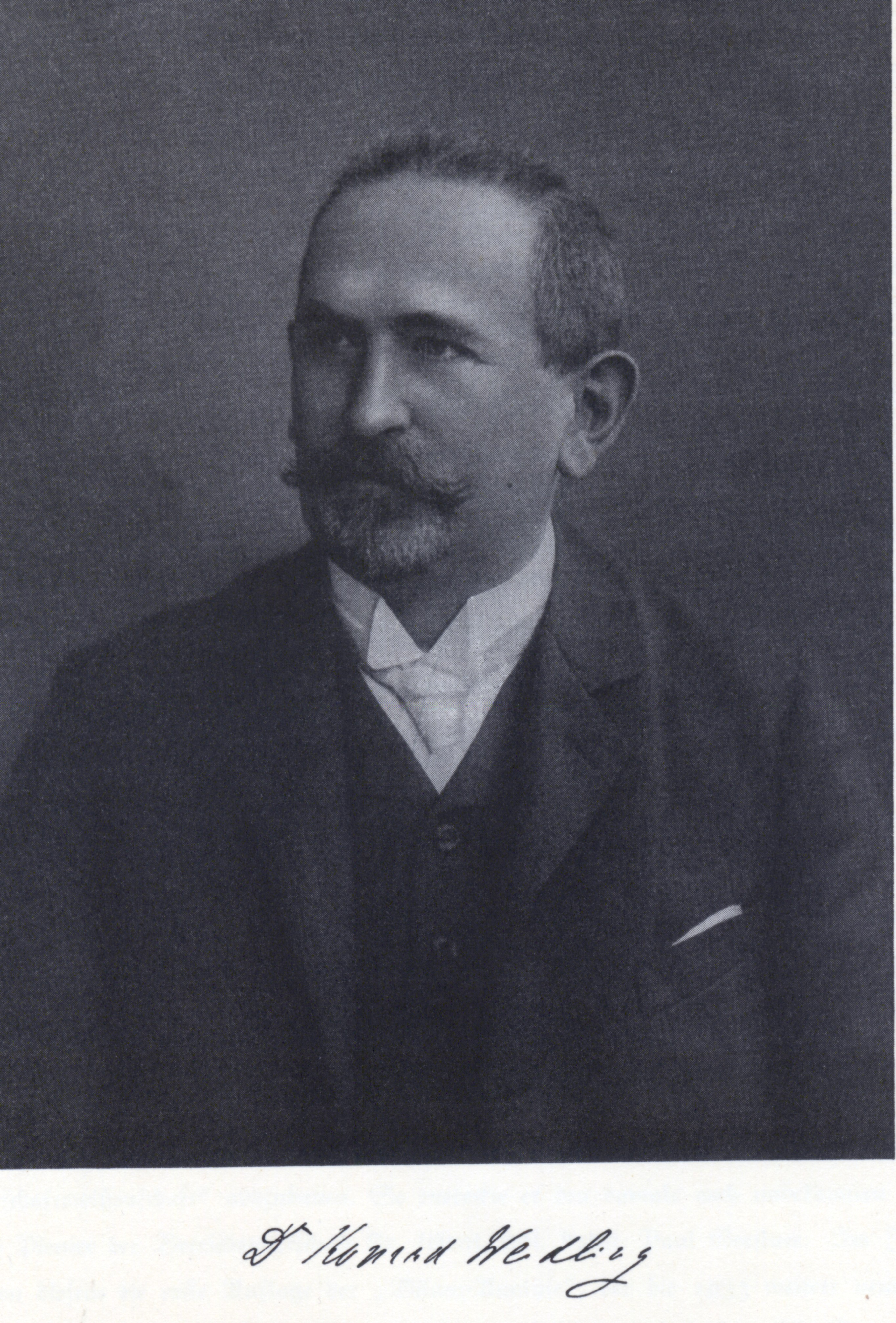 Porträt und Signatur von Konrad Weidling